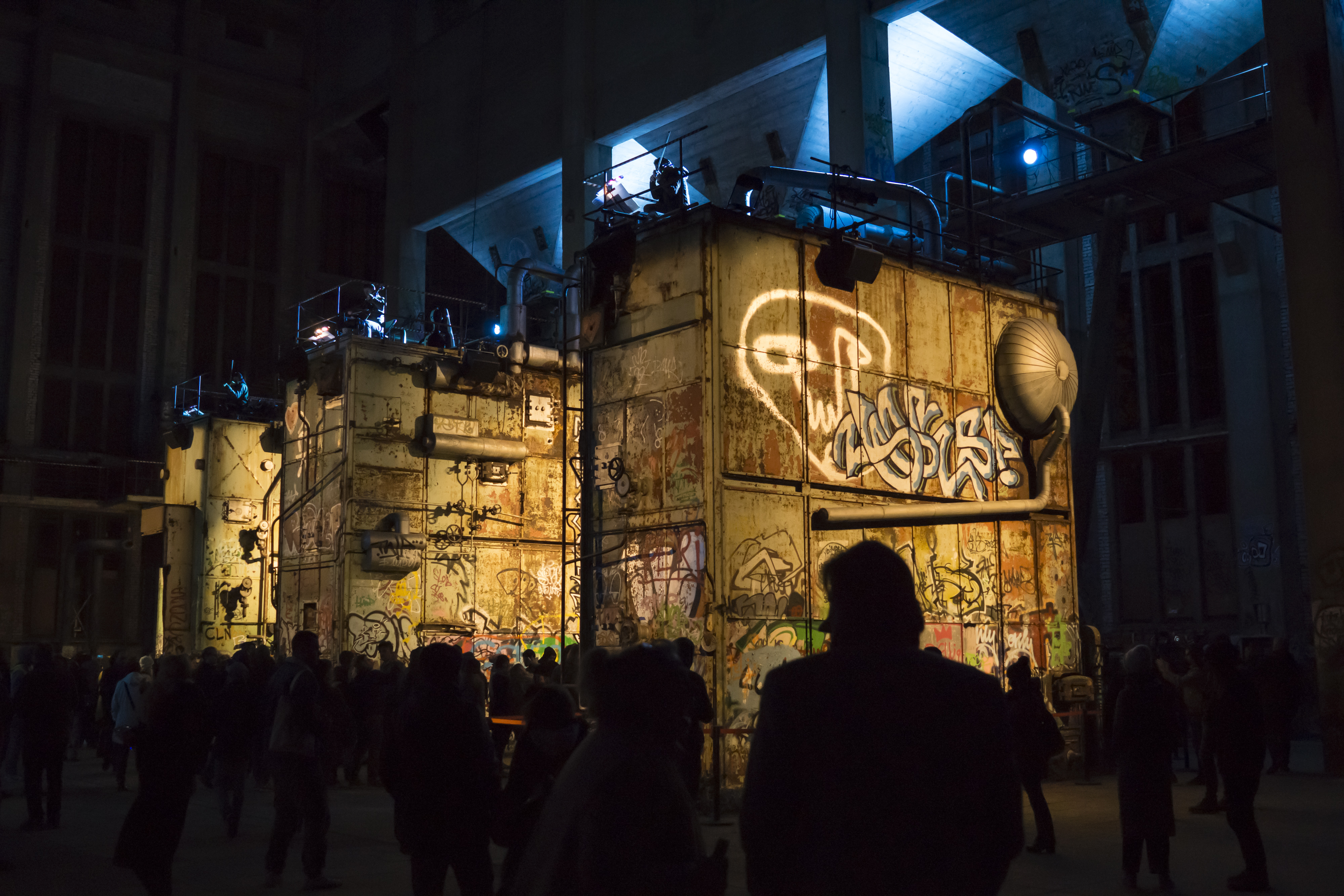 Mixed-Reality-Techno-Oper im Heizkraftwerk München-Aubing